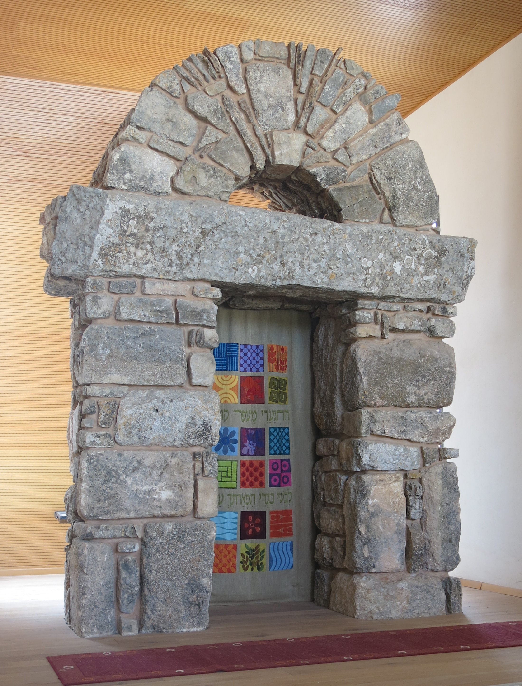 ארון הקודש בישיבת איתמר, נוצר ע"י האמן אסף קדרון